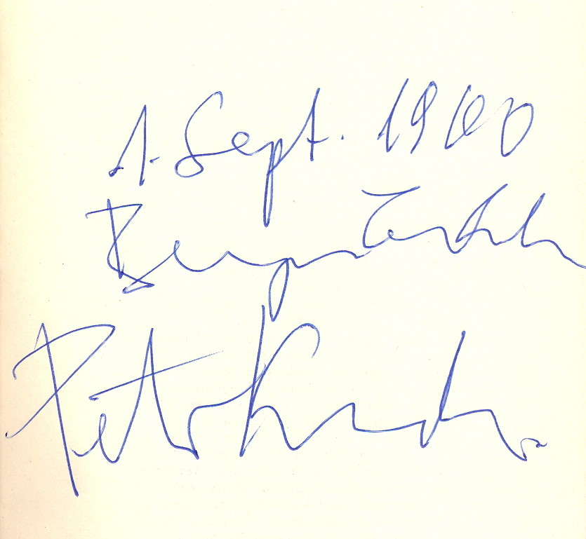 Autogramm von Peter Kurzeck